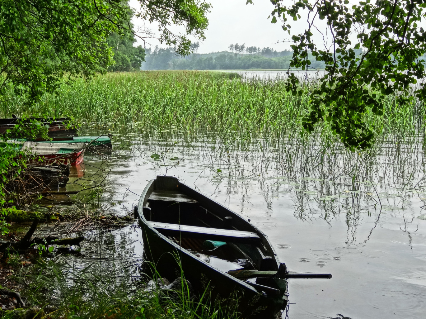 Jezioro na Pojezierzu Drawskim